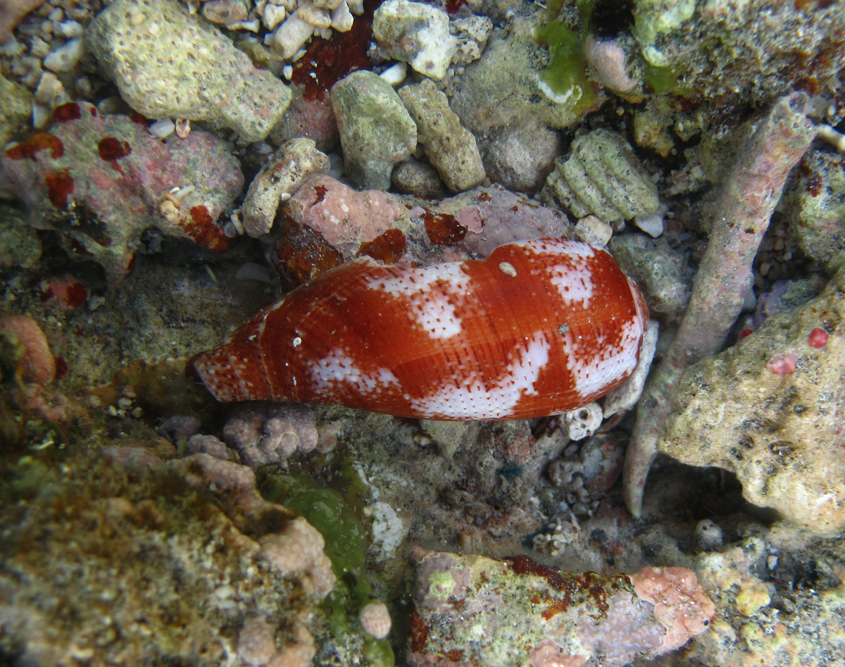 Coquille cassée de juvénile Conus tulipa à la Réunion.